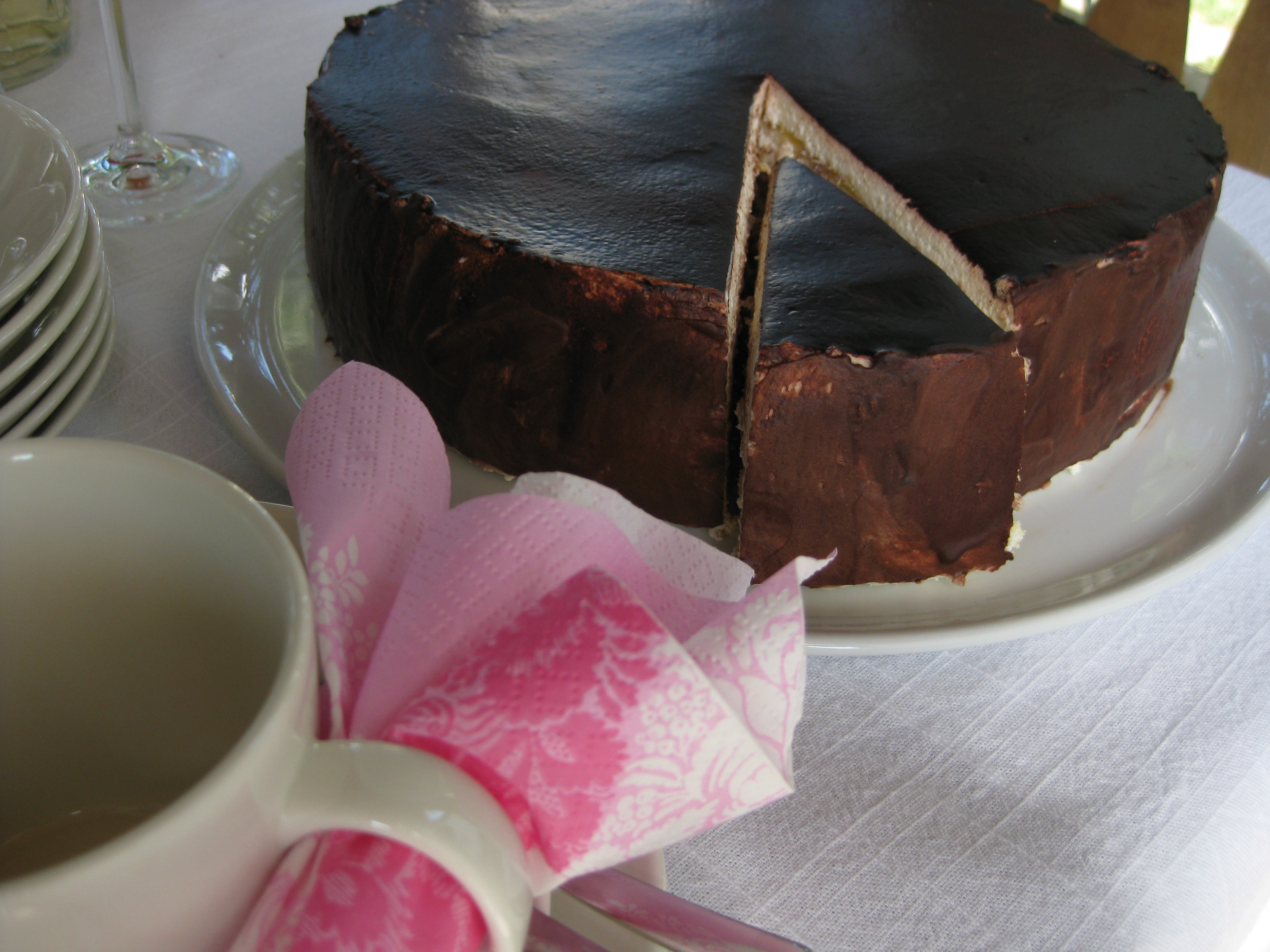 Die Schilleder Torte kommt aus dem Passauer Ortsteil Hals.